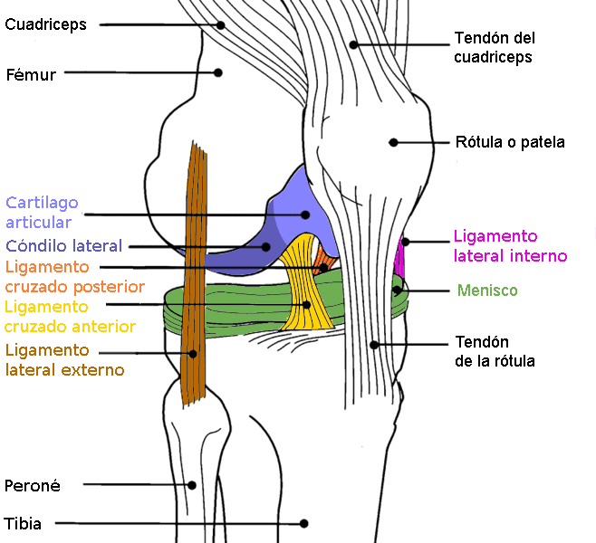 diagrama anatomía rodilla en color, knee anatomy colour